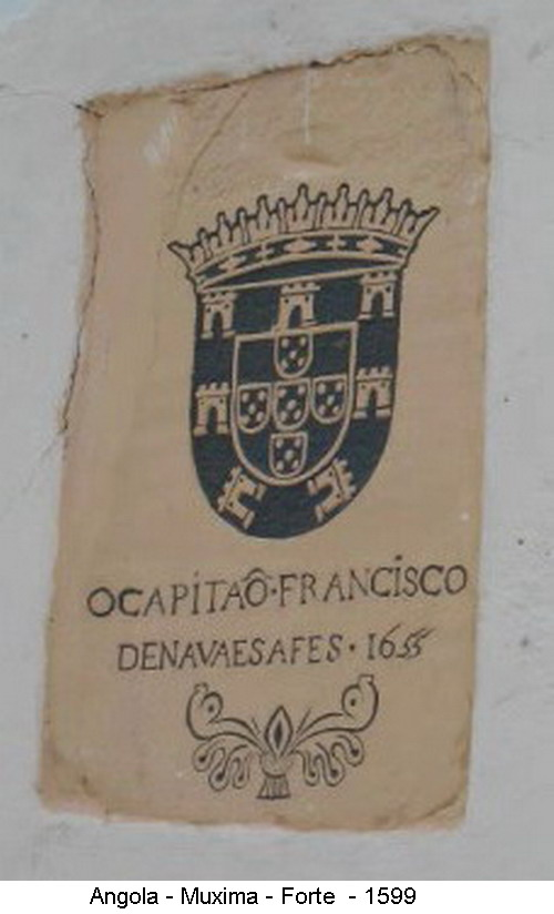 Placa existente na Fortaleza da Muxima